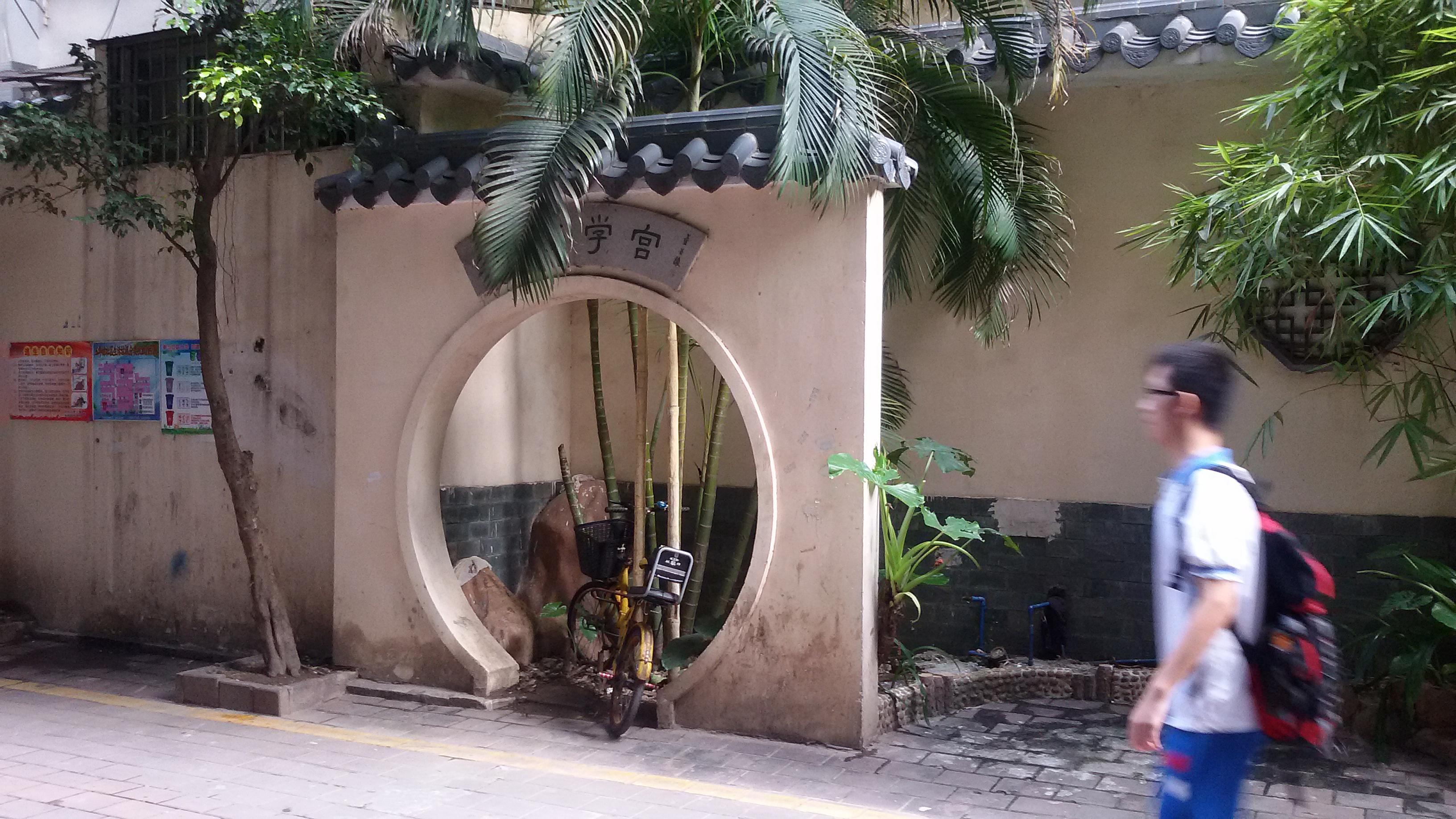 粵語: 南海學宮嘅牌坊